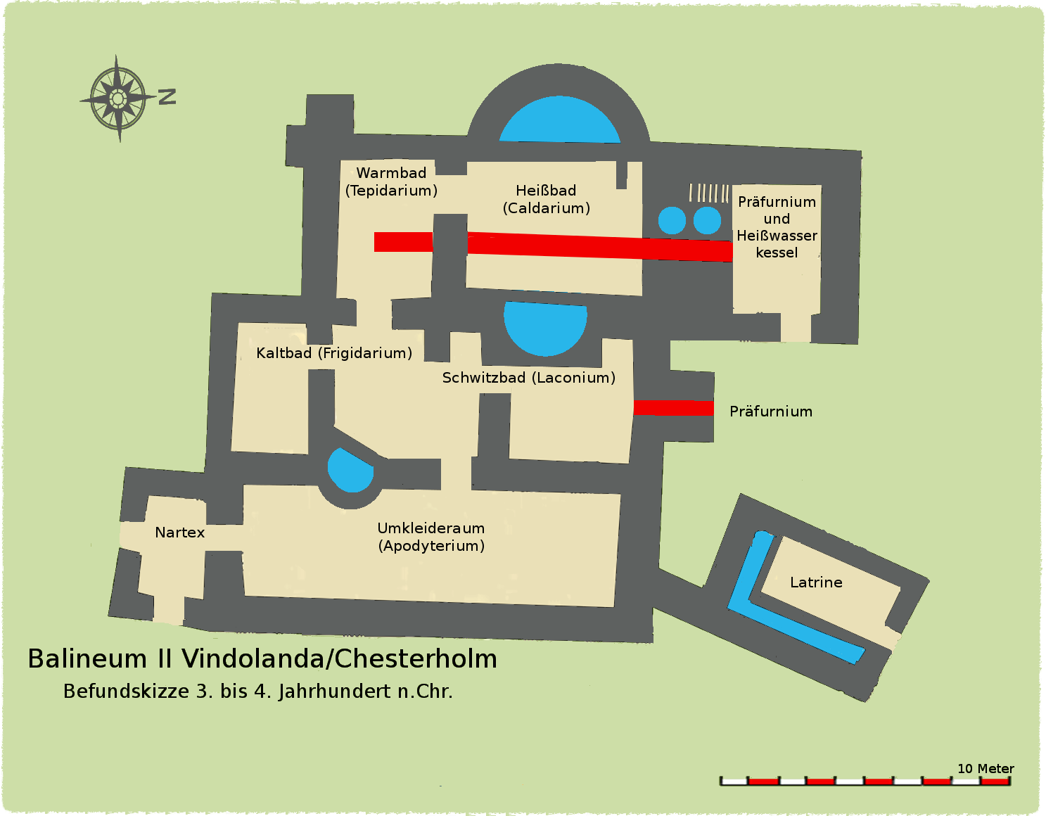 Befundskizze des Balineum II in Vindolanda/Chesterholm, 3. bis 4. Jahrhundert n.Chr.